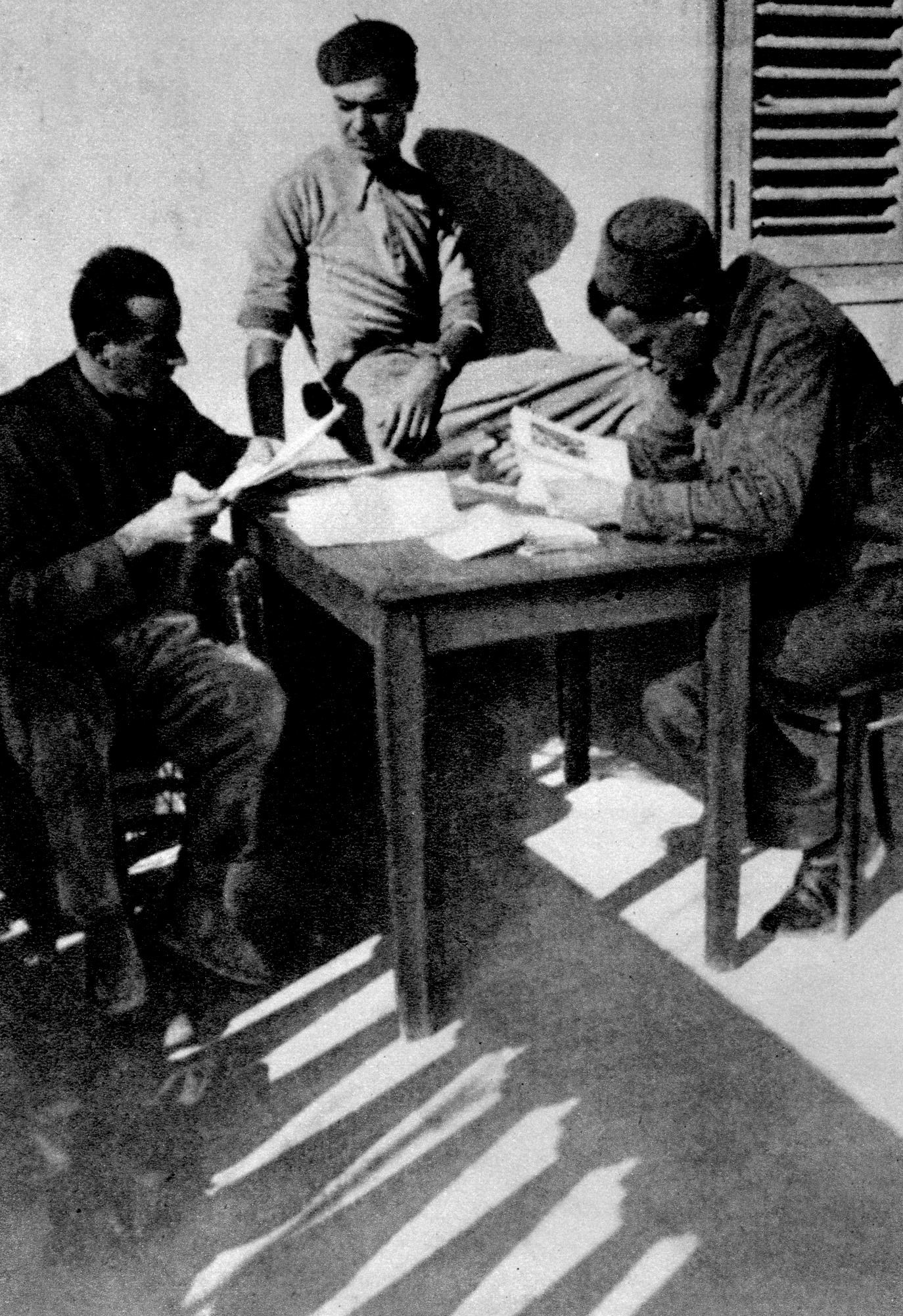 Posle povlačenja sa fronta 1938. godine. Levo sedi Stjepan Milašinčić, sa beretkom Branko Krsmanović.